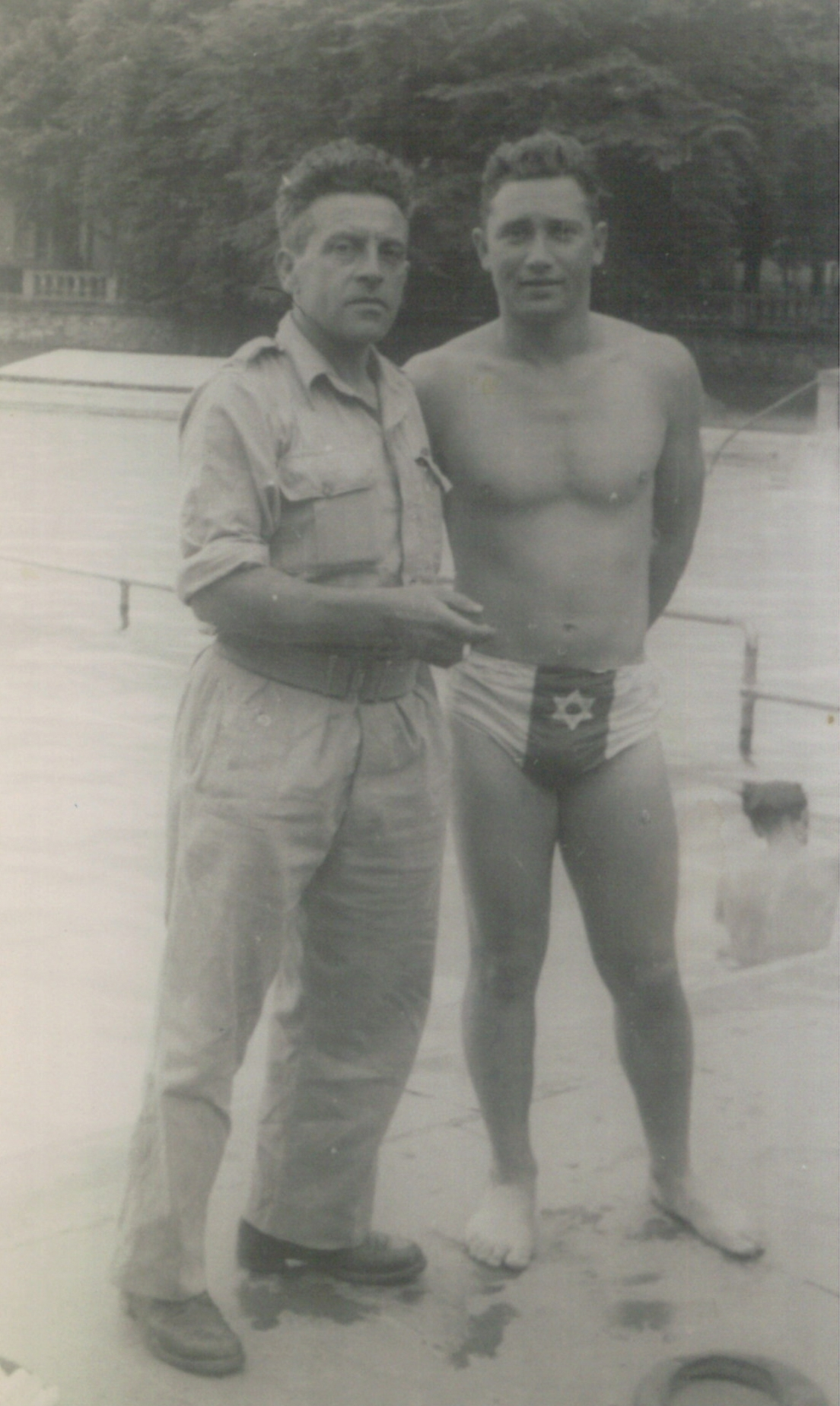 שמואליק לאחר ניצחון בתחרות שחייה במהלך שירותו בבריגדה היהודית